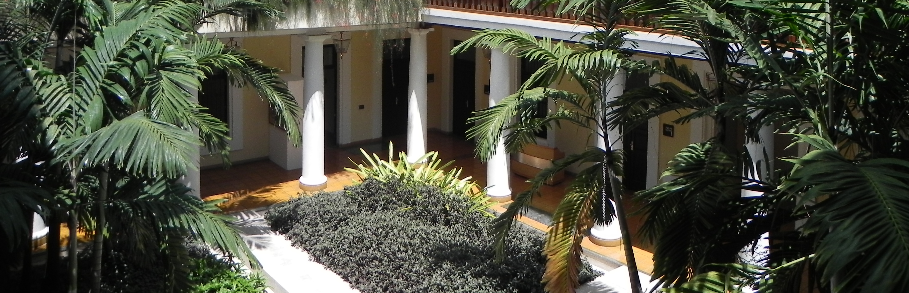 Claustro del antiguo Convento de San Francisco de Valencia, Venezuela